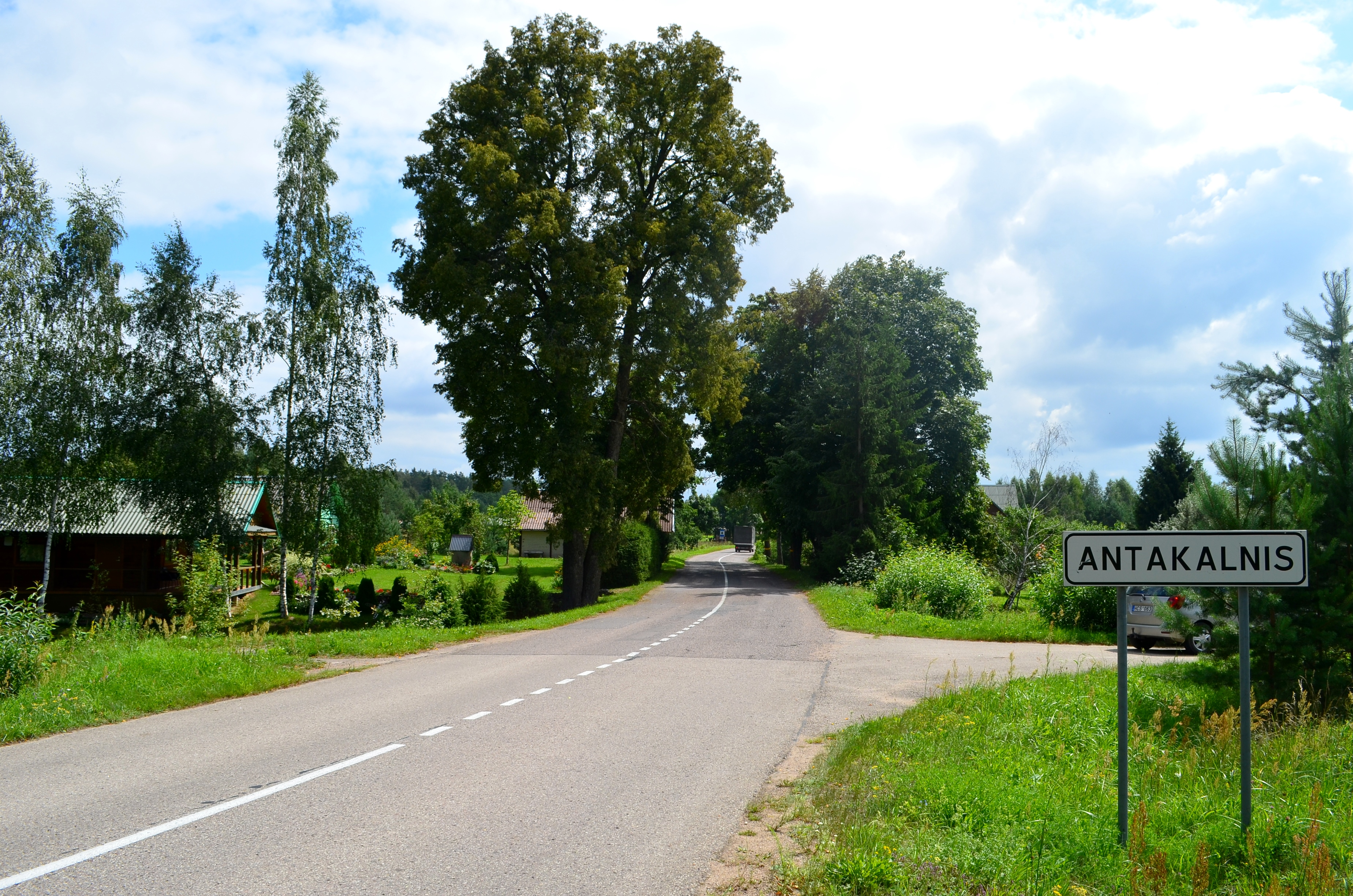 Antakalnio k., Saldutiškio sen., Utenos raj.